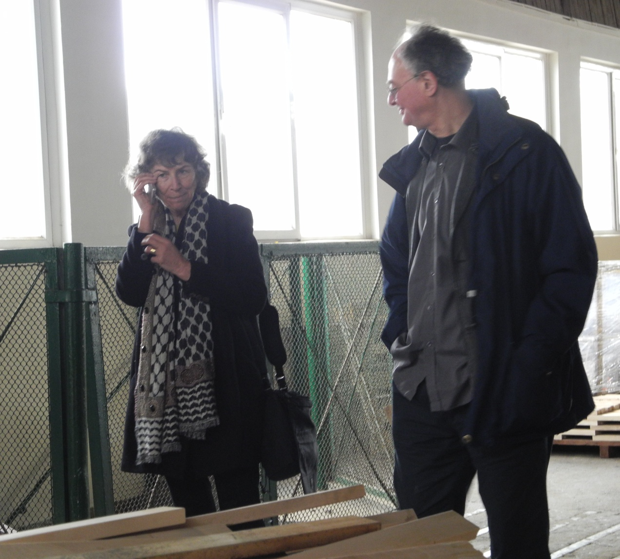 Kołacz, 2016. Potomkowie rodu Levy`ch w tartaku